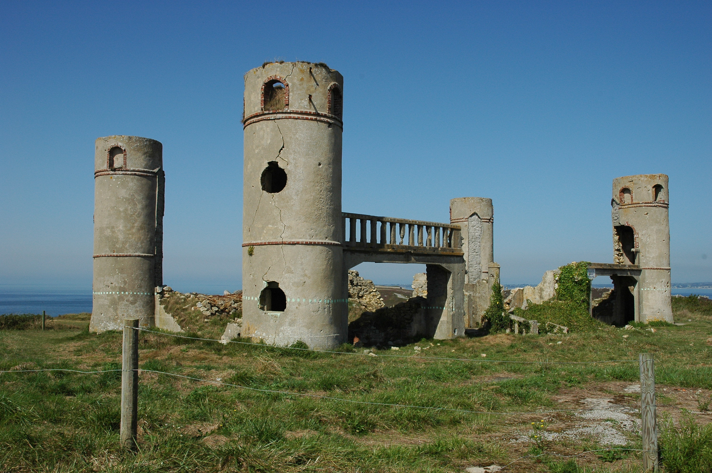 Ruines du manoir de Saint-Pol-Roux à Camaret-sur-Mer